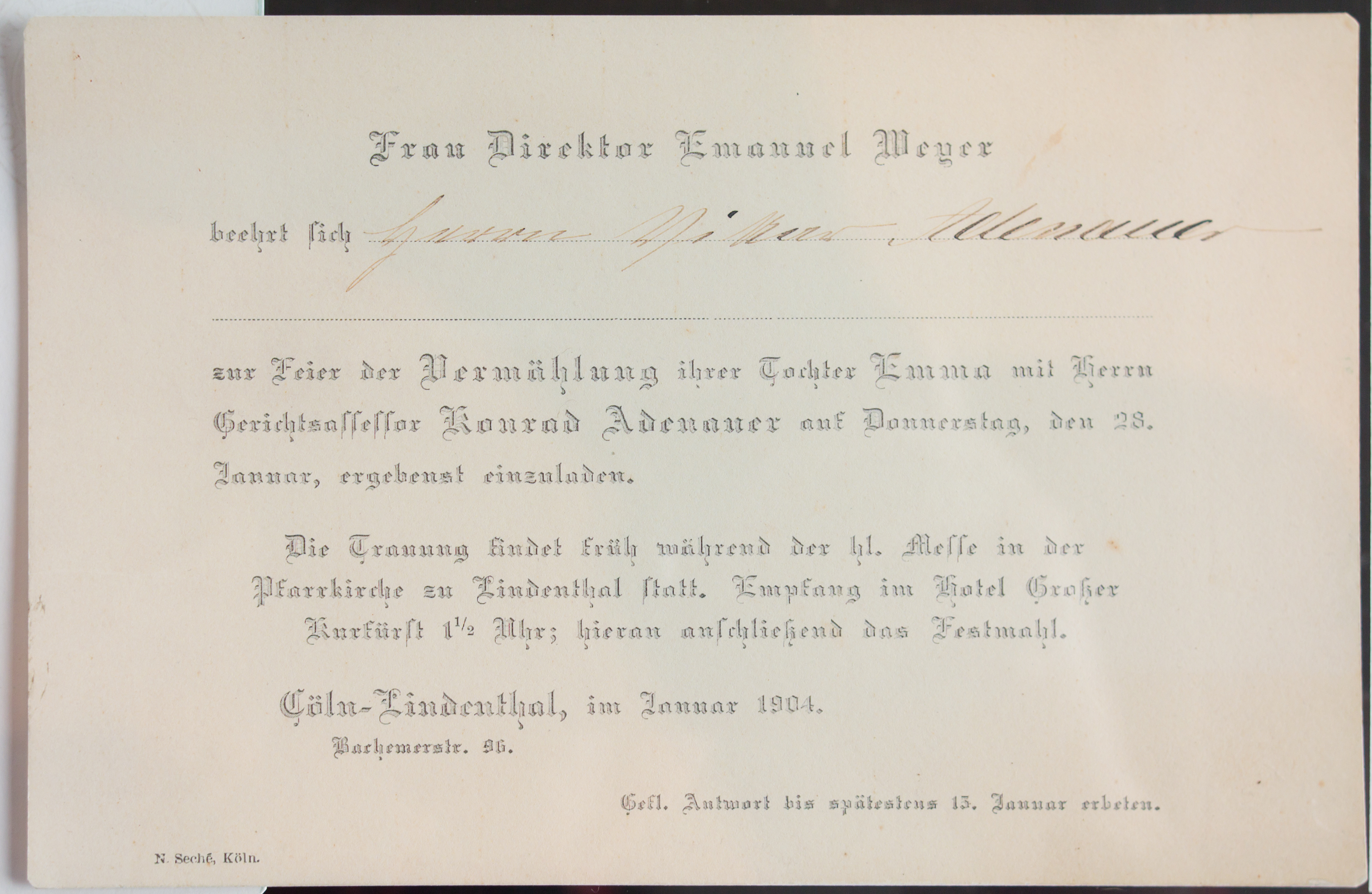 Einladungskarte zur Vermählung von Emma Weyer und Konrad Adenauer 1904